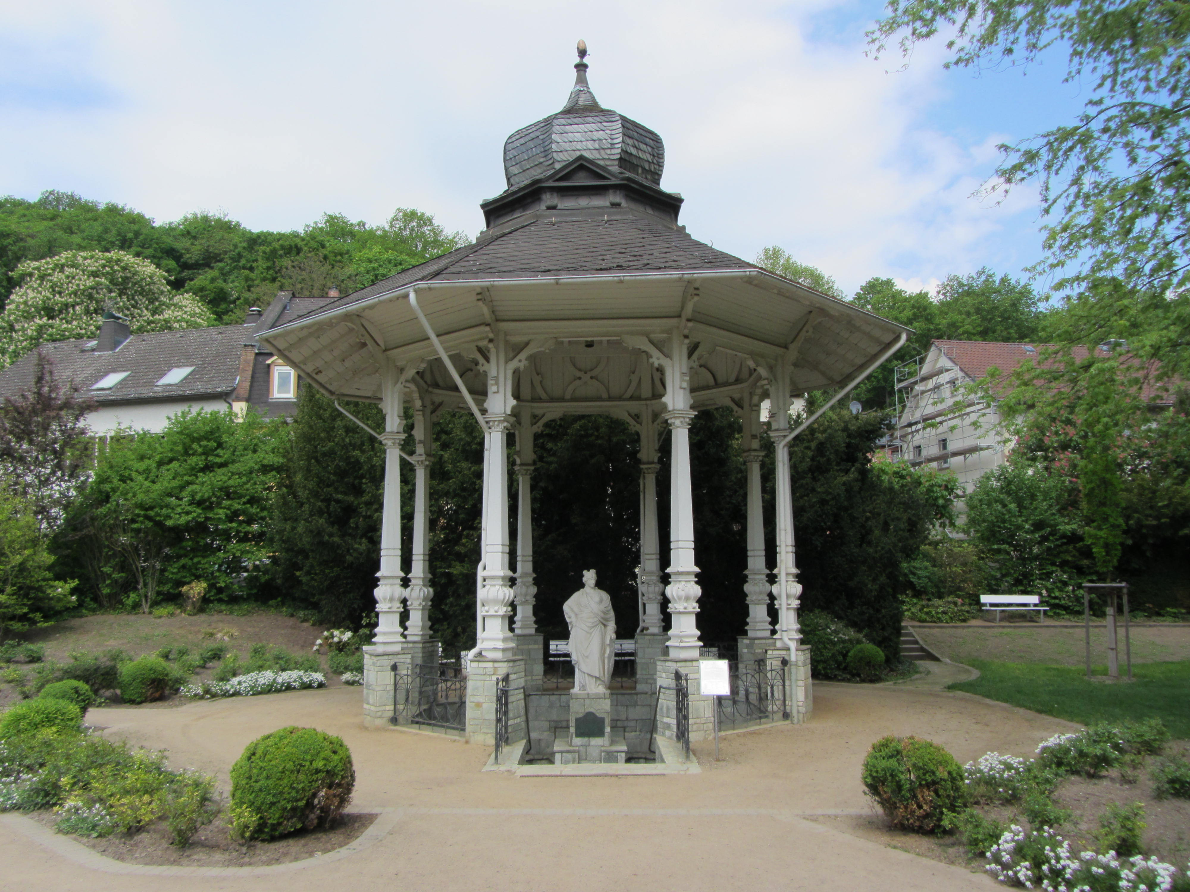 Der Solbrunnen im Quellenpark von Bad Soden Taunus